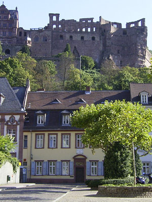 Das Mittermaierhaus vom Karlplatz aus gesehen.